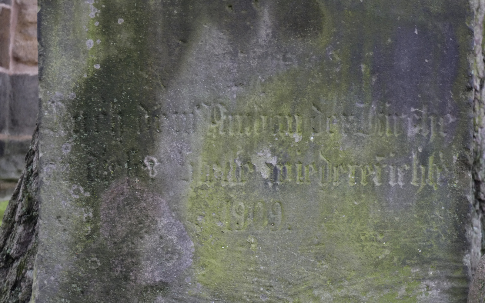 Inschrift am Sockel des Kriegerdenkmals in Gehrden